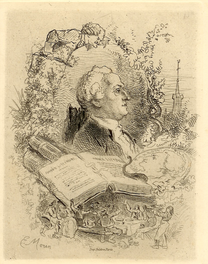 Élie Catherine Fréron von Edmond Morin (1824-1882), Frontipspiz zu Charles Monselet: Fréron, Pincebourd, Paris, 1864